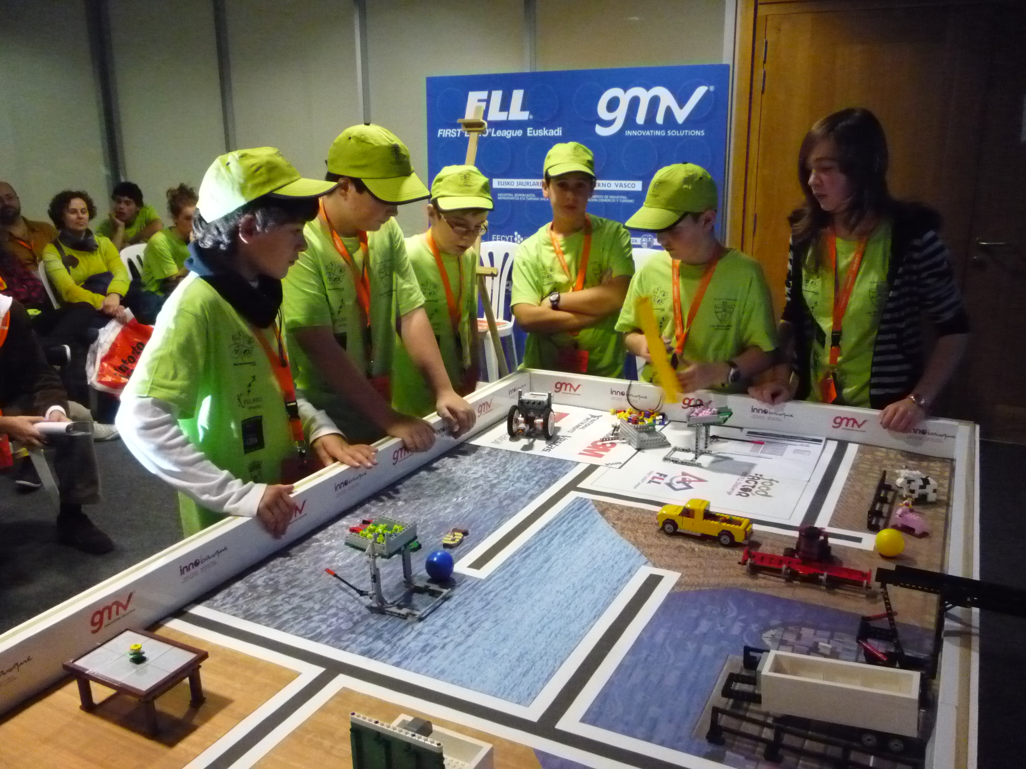 Burgeluko Los Patatronicos taldeko partaideak, FLL Euskadi 2011